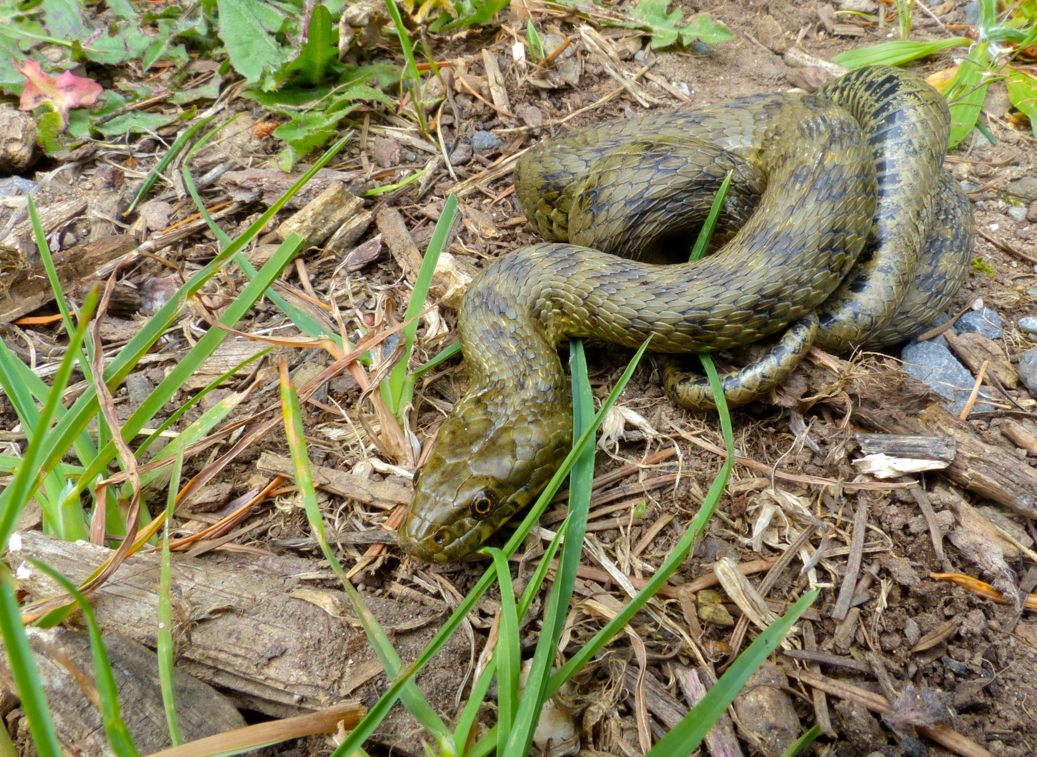 Avène, Hérault, FRANCE